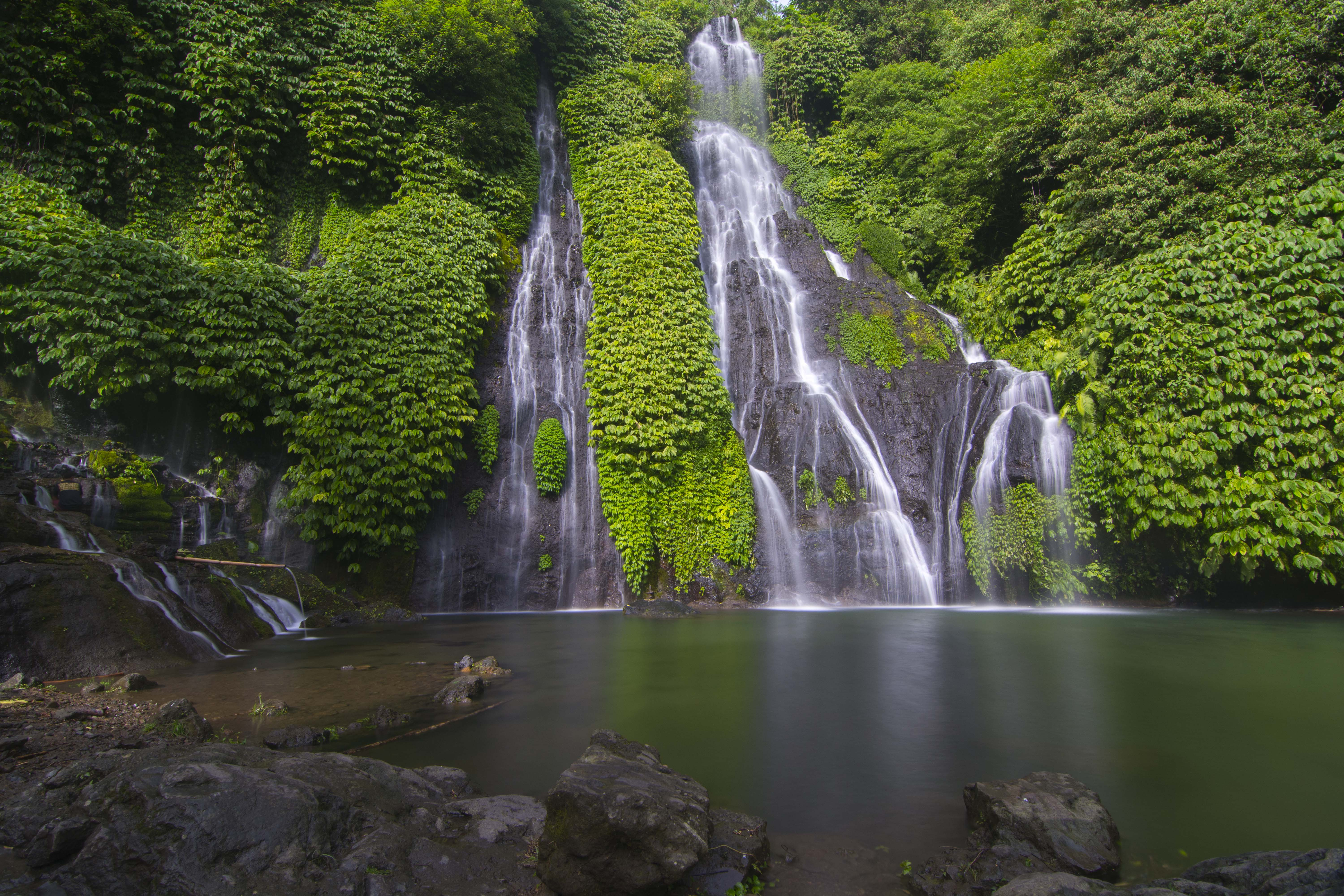 Banyumala waterfall ini terletak di Singaraja Bali